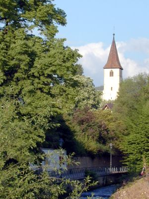 Inmitten der Altstadt (in der Fußgängerzone) ist die Martinskirche zu finden. Der Turm der Urkirche stammt aus dem 14. Jahrhundert. Erbaut wurde die Kirech auf den Mauerresten einer römischen Villa. Ausgrabung und Reste einer römischen Fußbodenheizung sind im Inneren der Kirche zu besichtigen.